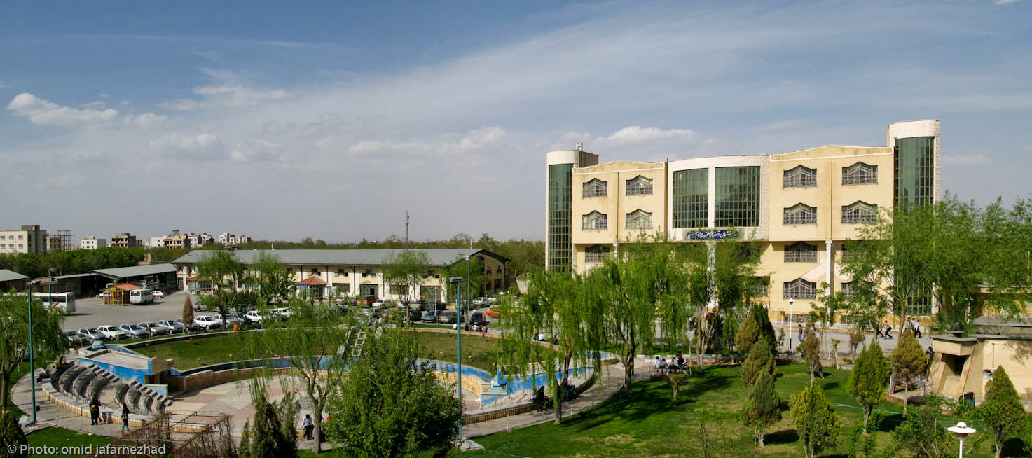 ساختمان امام خمینی دانشگاه آزاد اراک واحد قائم مقام فراهانی قنات